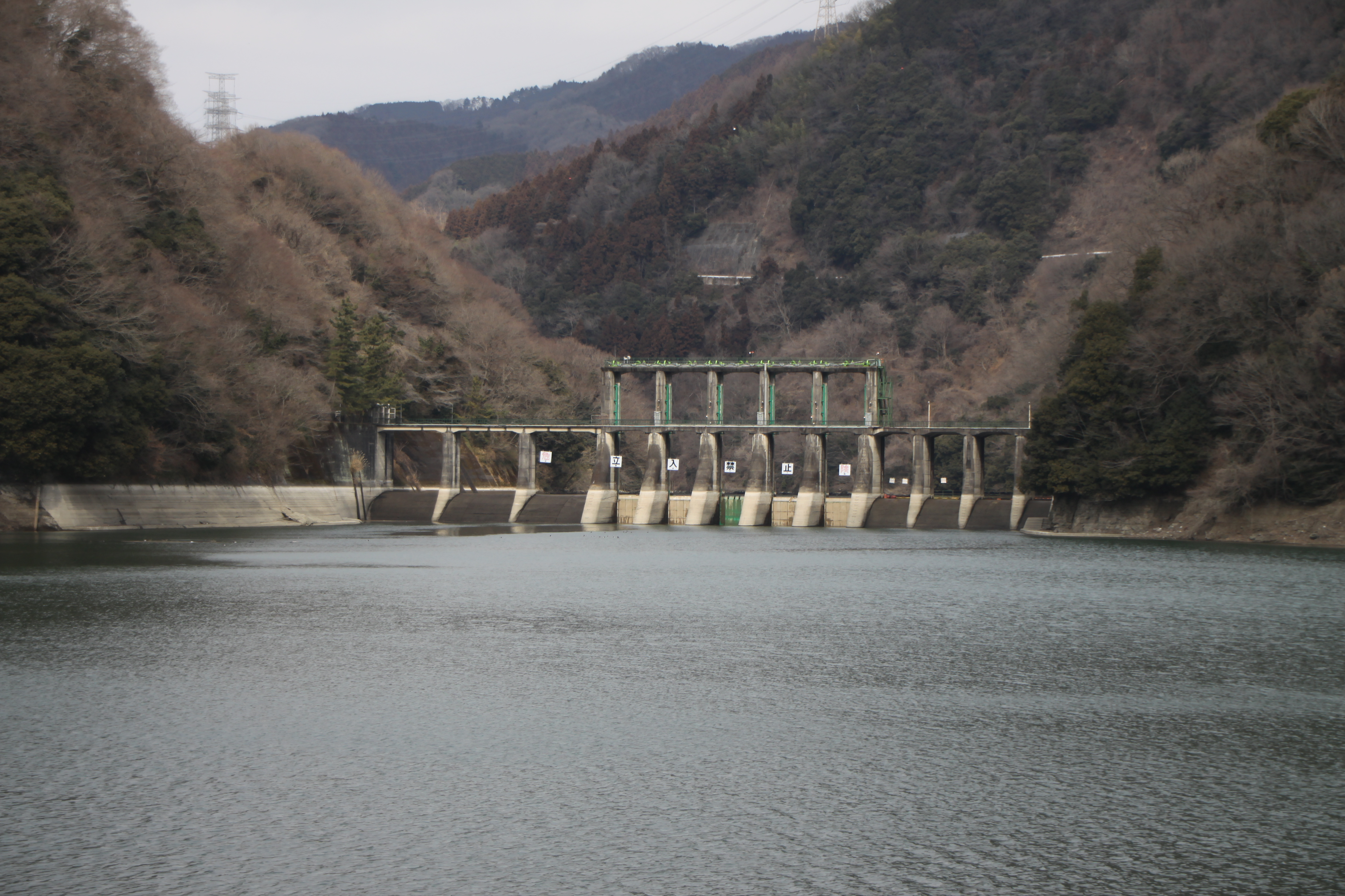 沼本ダム。半分水没している